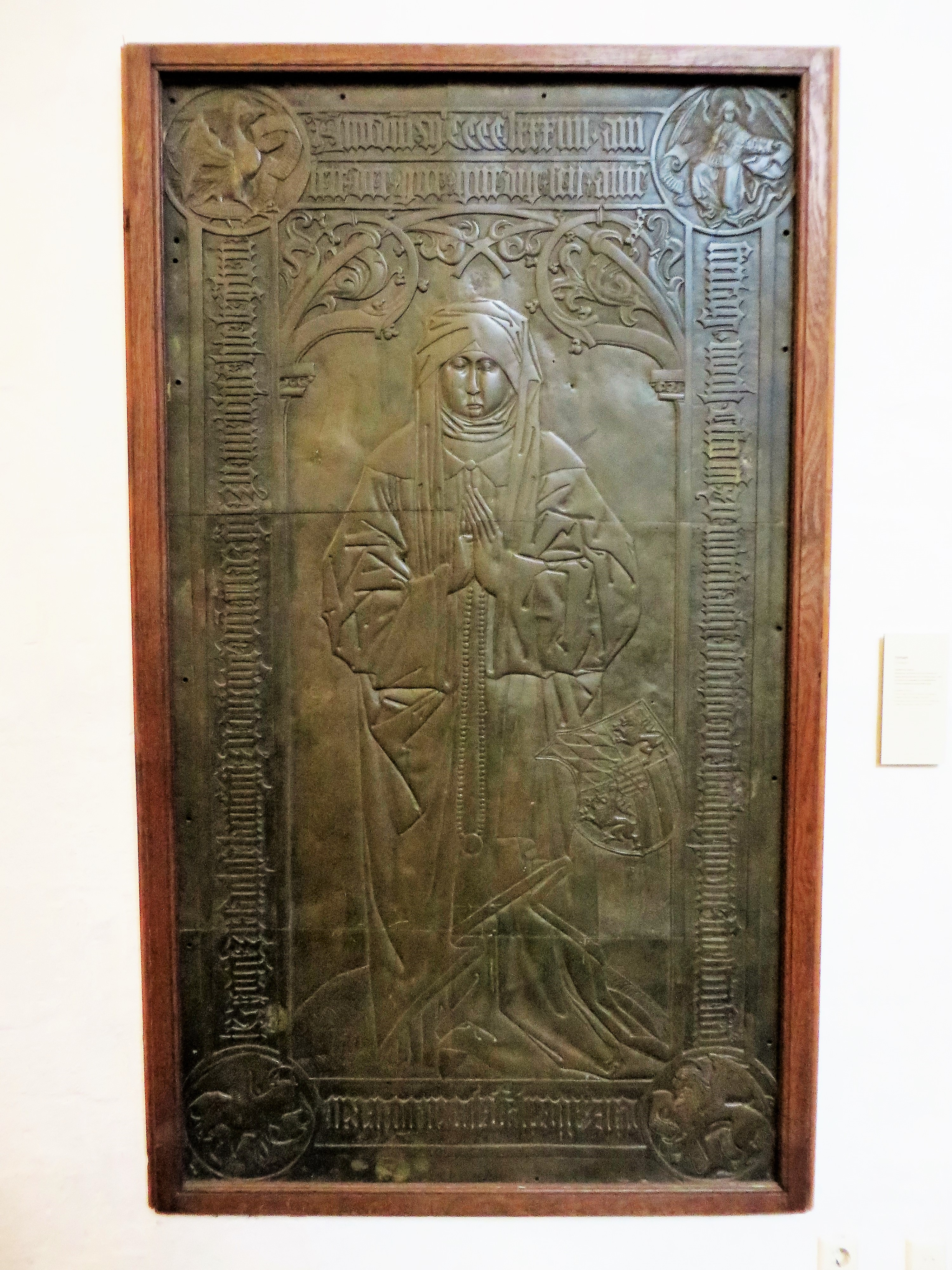 Ev. Stadtkirche St. Thomas Leipzig. Im Bereich der Vierung, am ersten südlichen Pfeiler, ist die bronzene Grabplatte der Herzogin Elisabeth von Sachsen (gest. 1484) eingelassen, Ehefrau des Kurfürsten Ernst von Sachsen und Tochter Herzog Albrechts III. von Bayern.